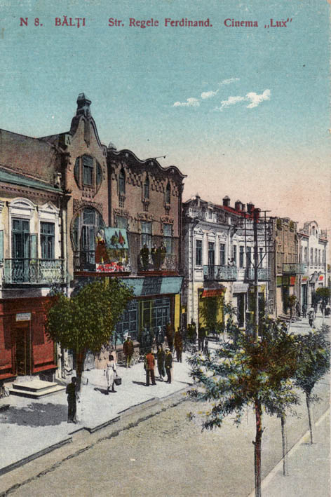 Cinematograful Lux din Bălți, anii 1930 (clădirea nu s-a păstrat)